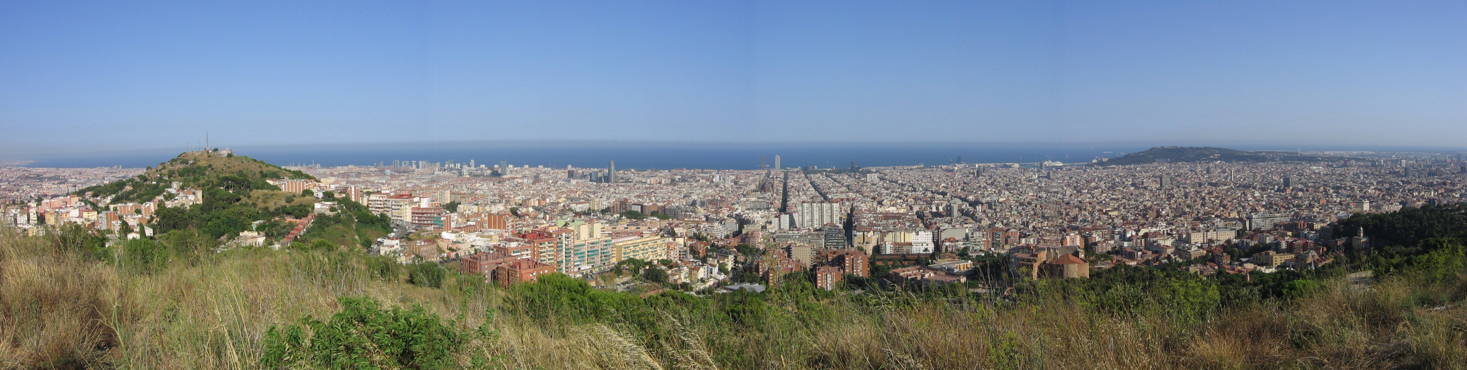 Barcelona vista desde el monte Carmelo.